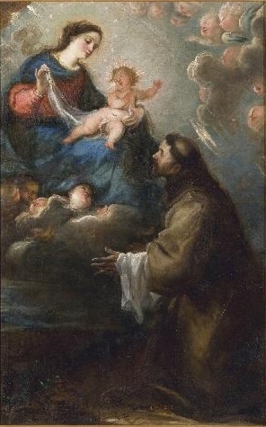 La obra representa a la Virgen María, que lleva en sus brazos al Niño Jesús, apareciéndose a San Francisco de Asís, que fue el fundador de la Orden de los franciscanos.